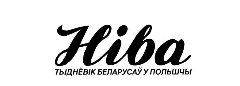 Winieta „Niwy” - Tygodnika Białorusinów w Polsce